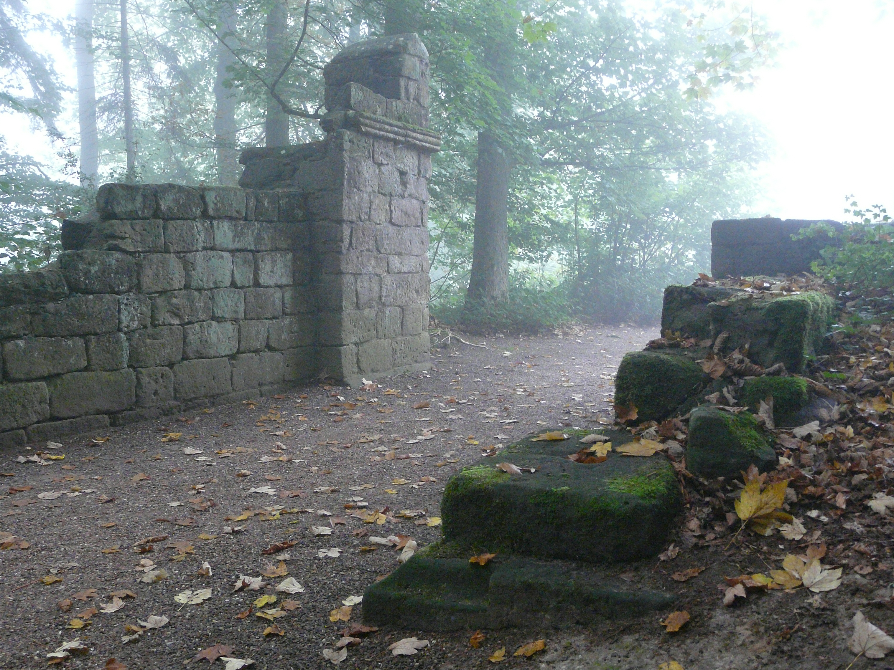 Im Eulbacher Park wiederaufgebaute Toranlage des Kastells Eulbach (ORL 48, Odenwaldlimes), Innenansicht